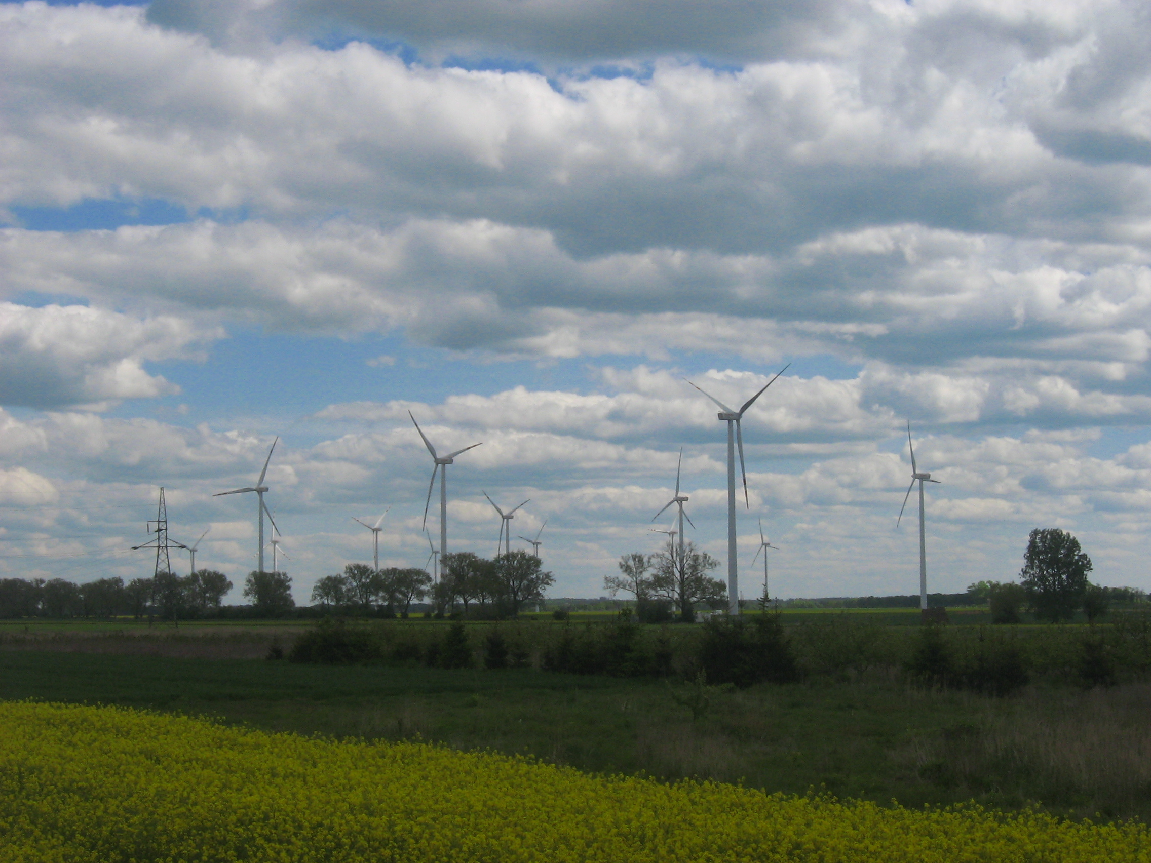 Farma Wiatrowa Ostrowo